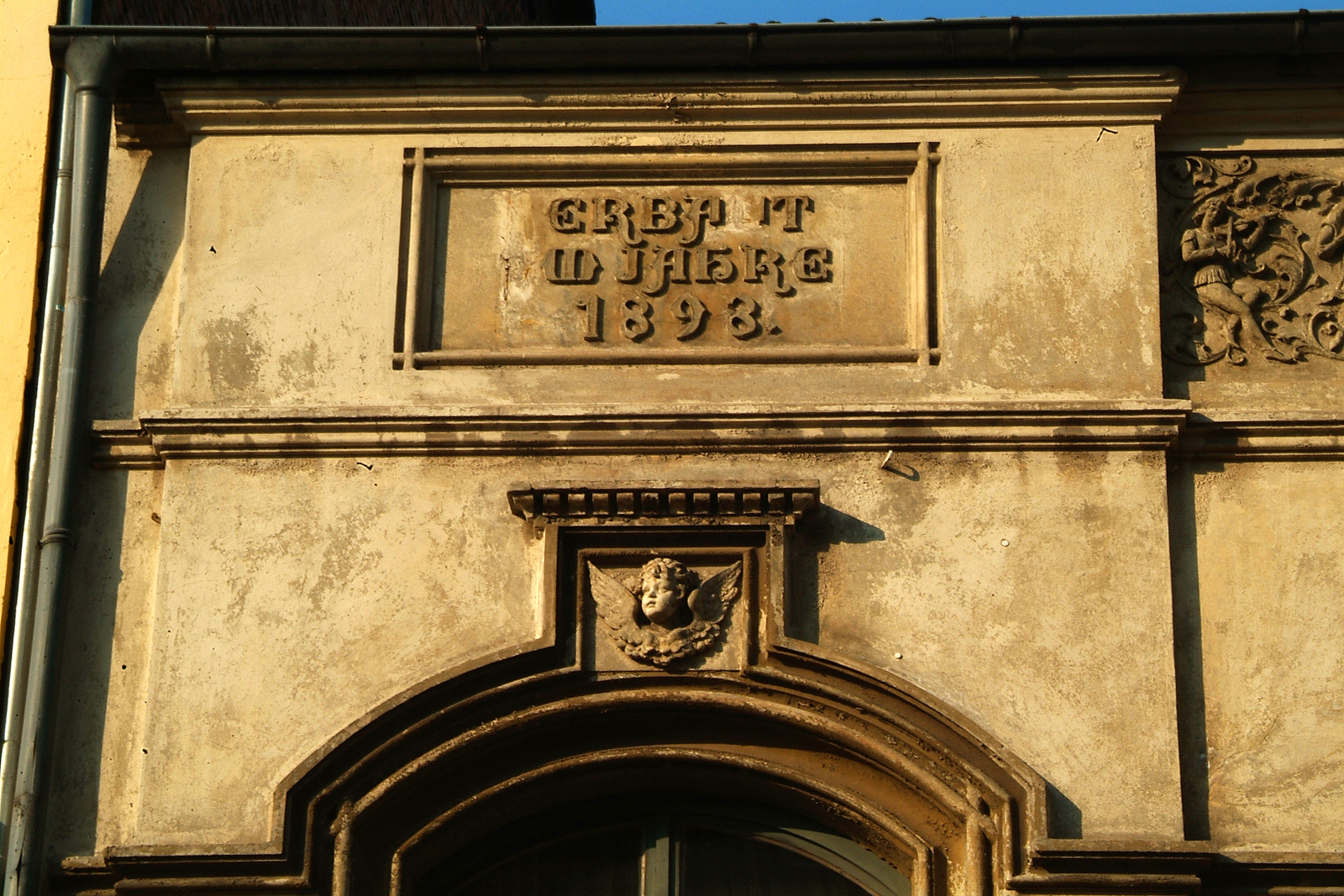 Sie haben ein besseres Bild? Sogar ein historisches Dokument als Bild(ungsförderung)? Zeigen Sie' s uns. Stiften Sie es, allen Menschen.